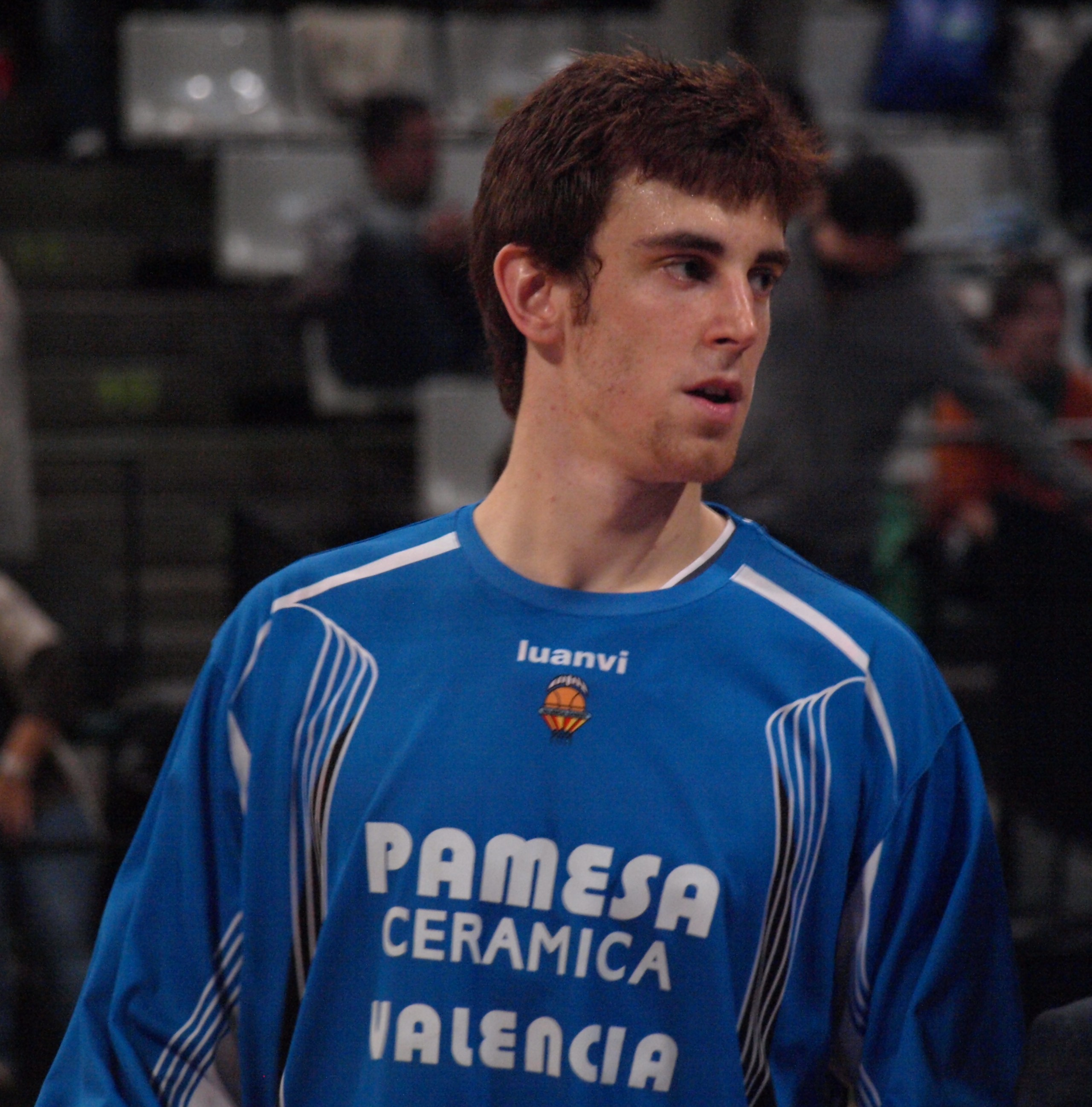 Víctor Claver en el partido que enfrentó a su equipo, el Pamesa Valencia, al DKV Joventut de liga ACB en el Pabellón Olímpico de Badalona en abril de 2009.